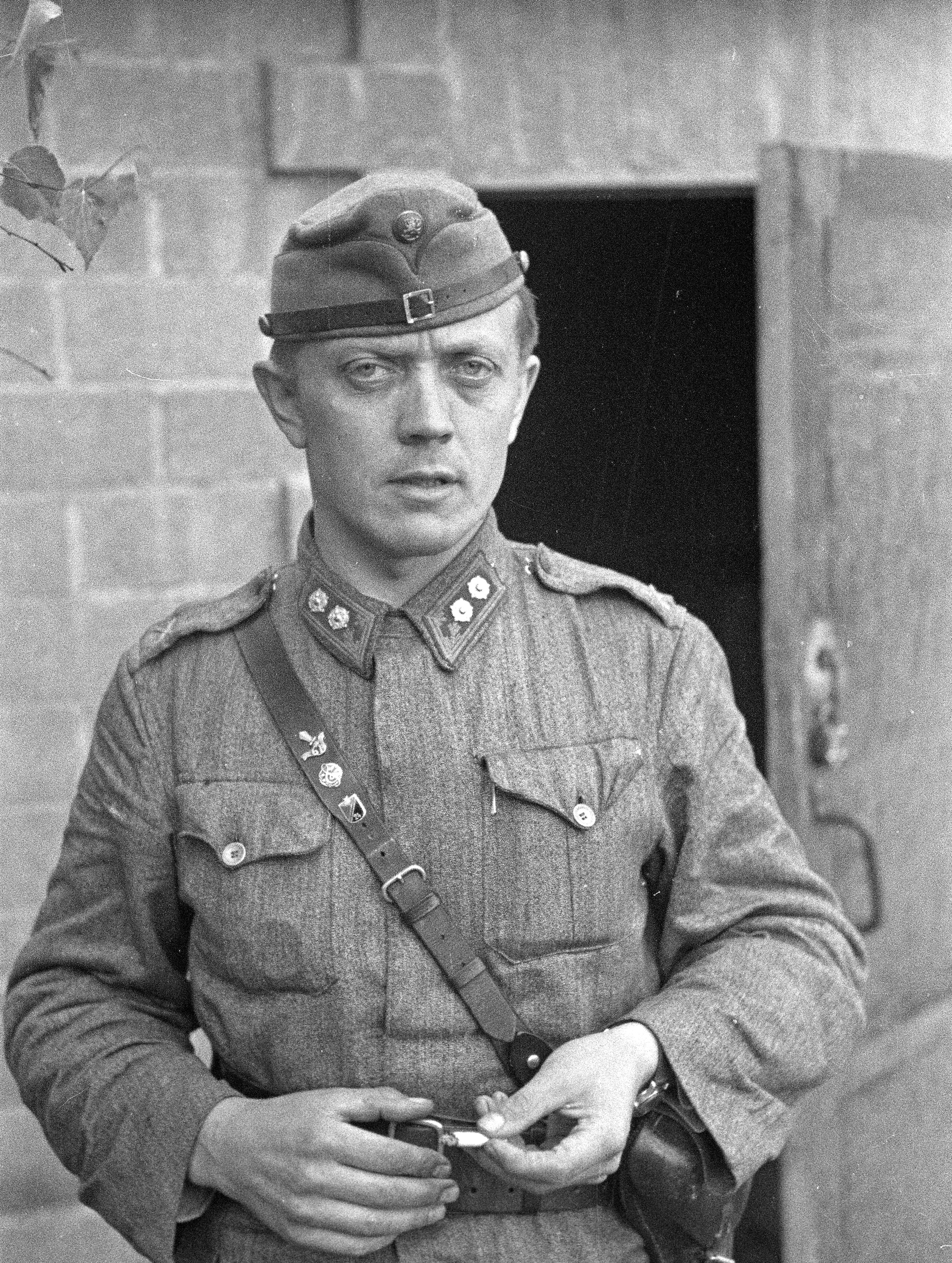 JR 61:n komentaja eversti Alpo Marttinen (1908–1975), armeijan nuorin eversti. (Ylennetty 24.6.1944.) Kuvauspaikka Sorvali, Viipuri.